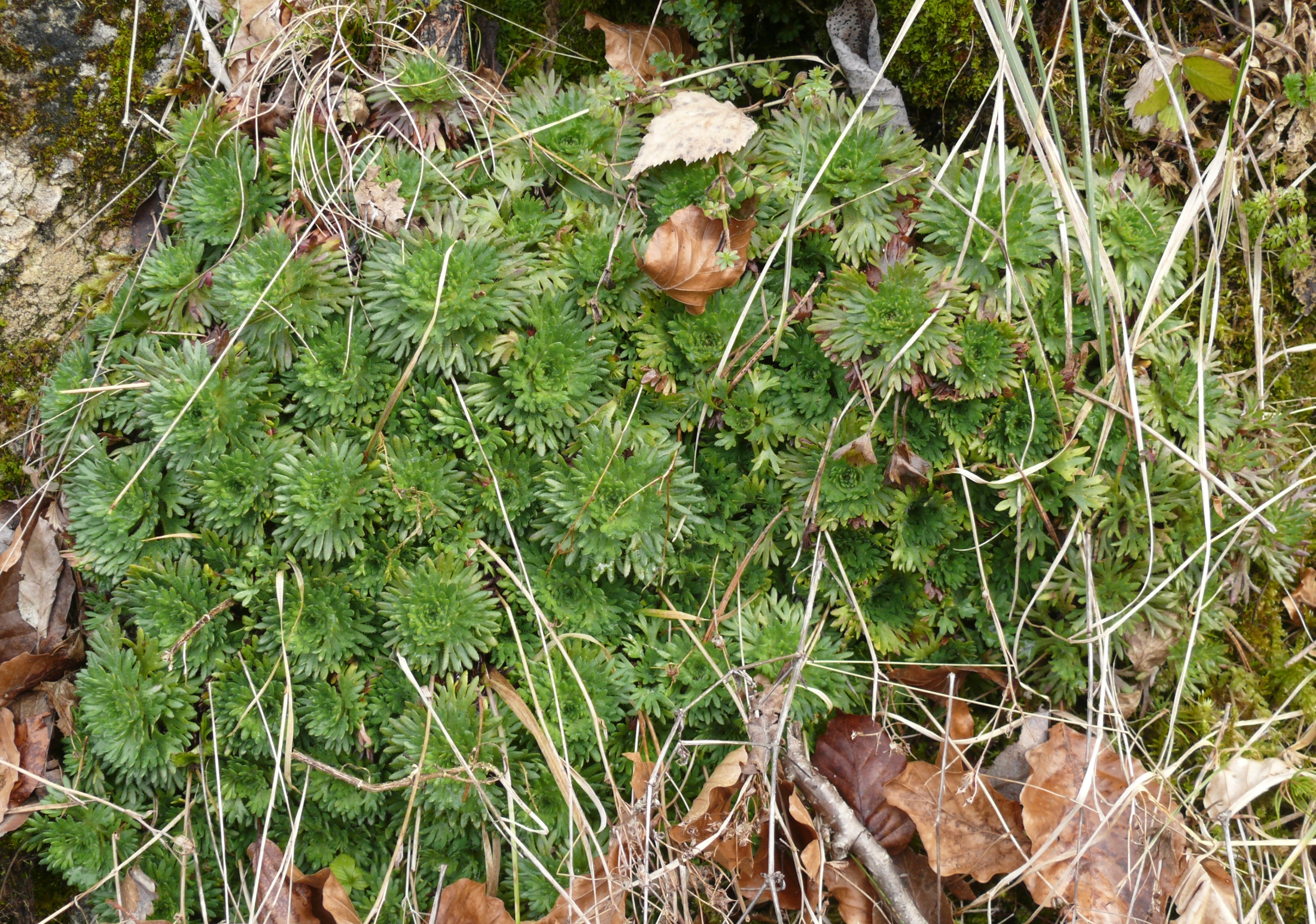 Saxifraga rosacea, Schwäbisch Alb, Deutschland